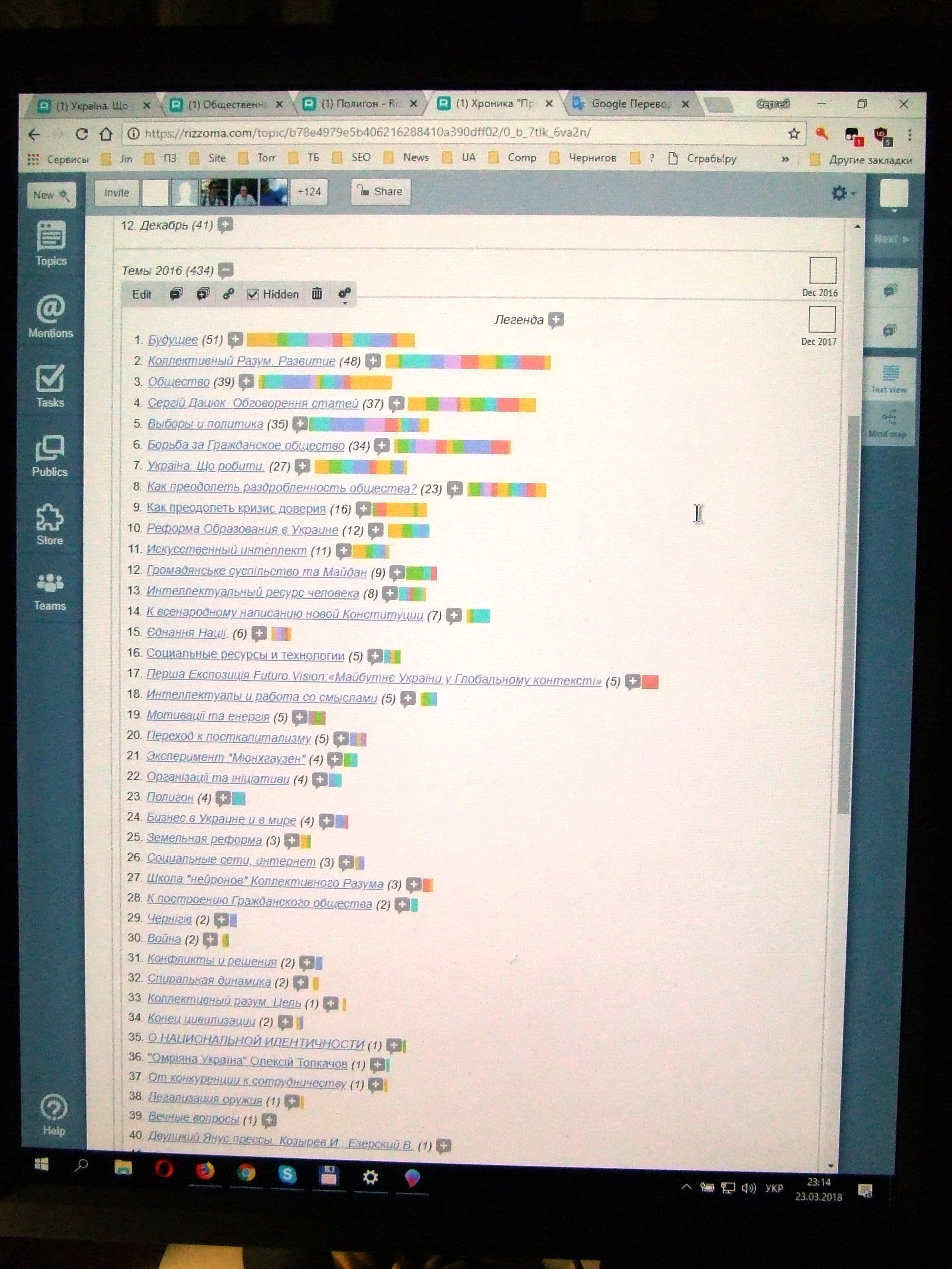 Статті та обговорення за 2016 рік на "Простір злагоди"